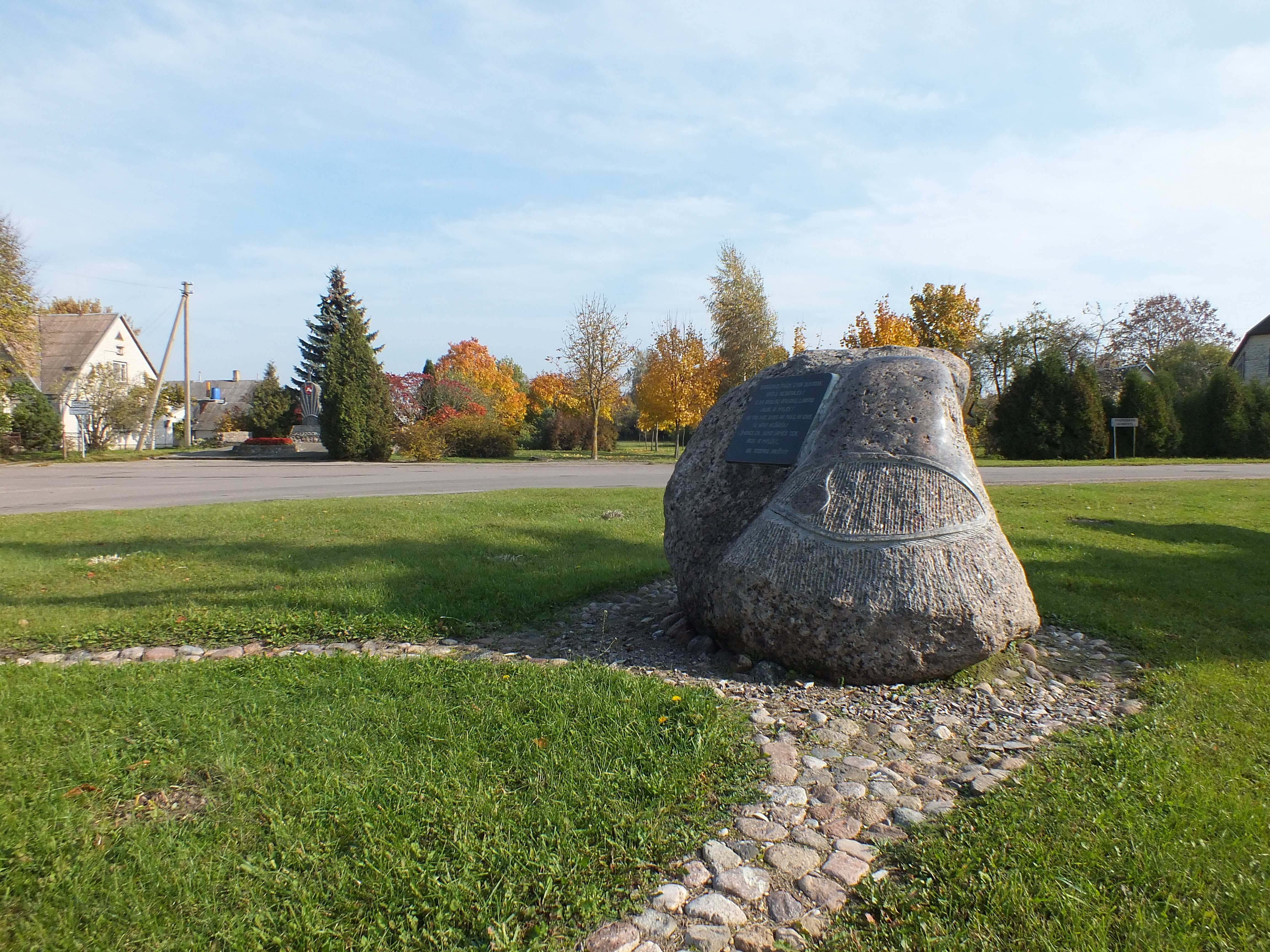 Pagiriai